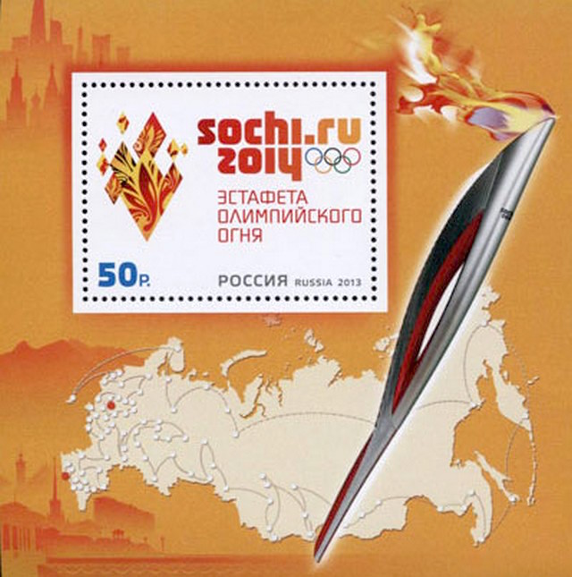 XXII Олимпийские зимние игры 2014 года в г. Сочи. Эстафета Олимпийского огня